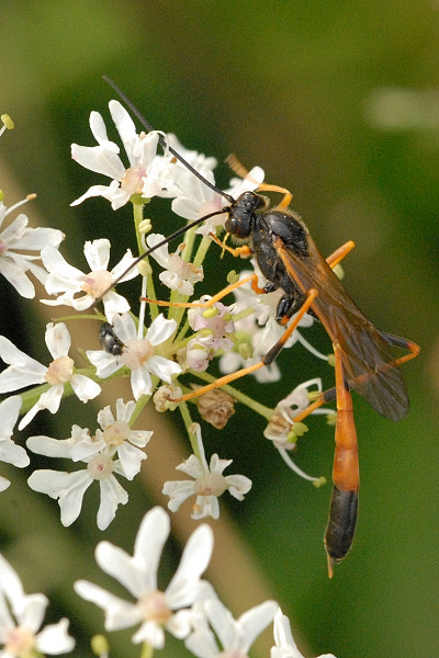 Erigorgus melanobatus from Commanster, Belgian High Ardennes .